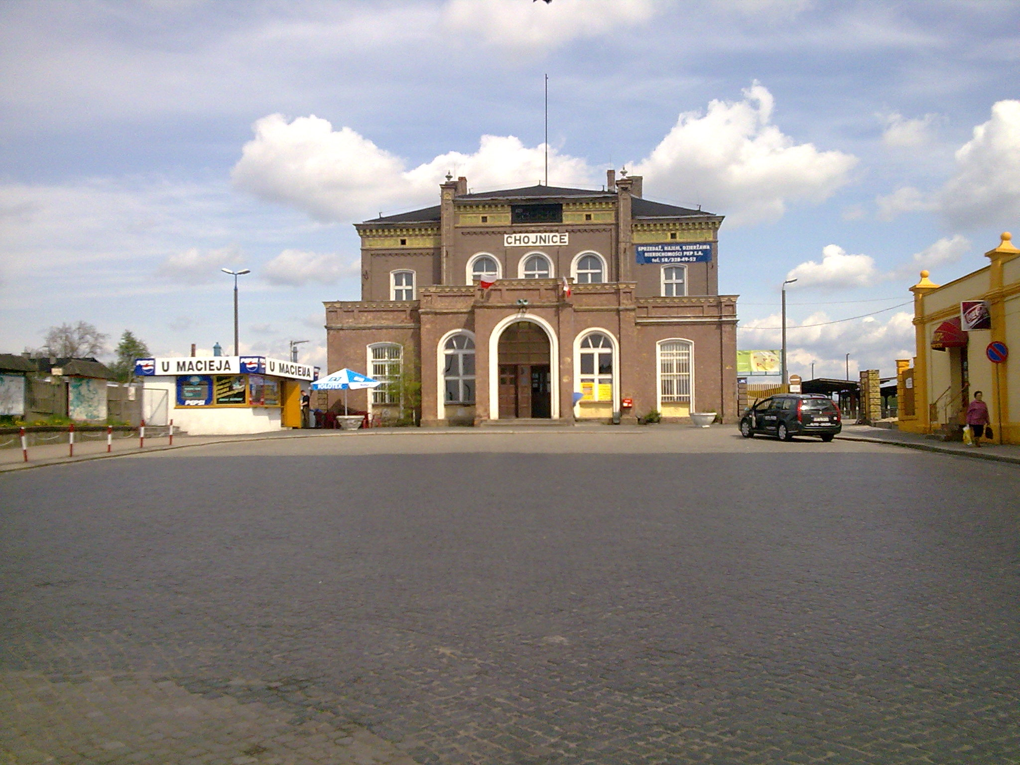 Dworzec PKP w Chojnicach